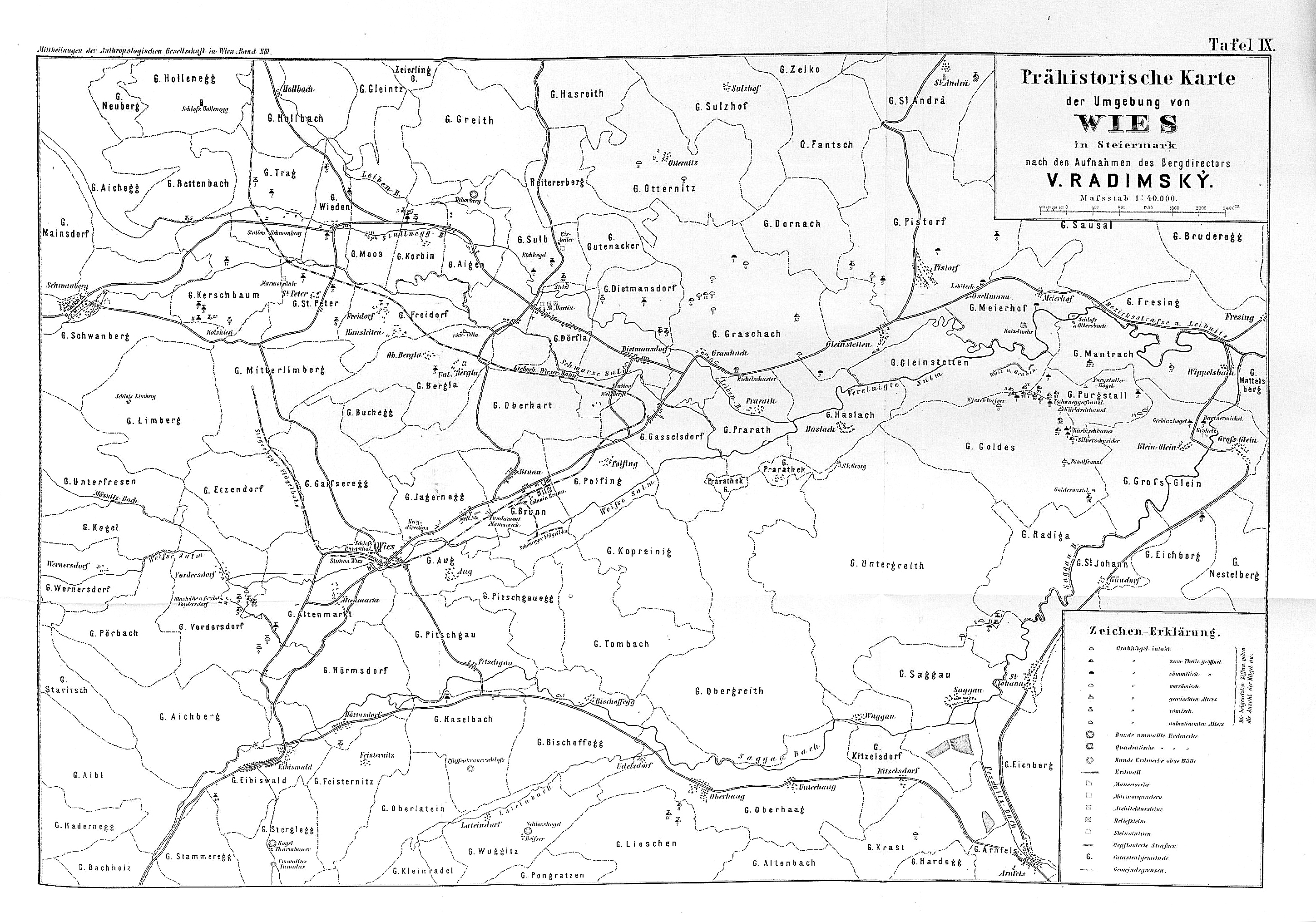 Karte der archäologischen Fundstellen in der Südweststeiermark, Stand 1883. V(áclav, auch: Wenzel) Radimský: Tafel IX zum Beitrag: Urgeschichtliche Forschungen in der Umgegend von Wies in Mittel-Steiermark. I. Die prähistorischen Denkmale der Umgebung von Wies. In: Franz Hauer (Red.): Mitteilungen der Anthropologischen Gesellschaft in Wien - MAG. Band XIII (Band III der neuen Folge) Jahrgang 1883.